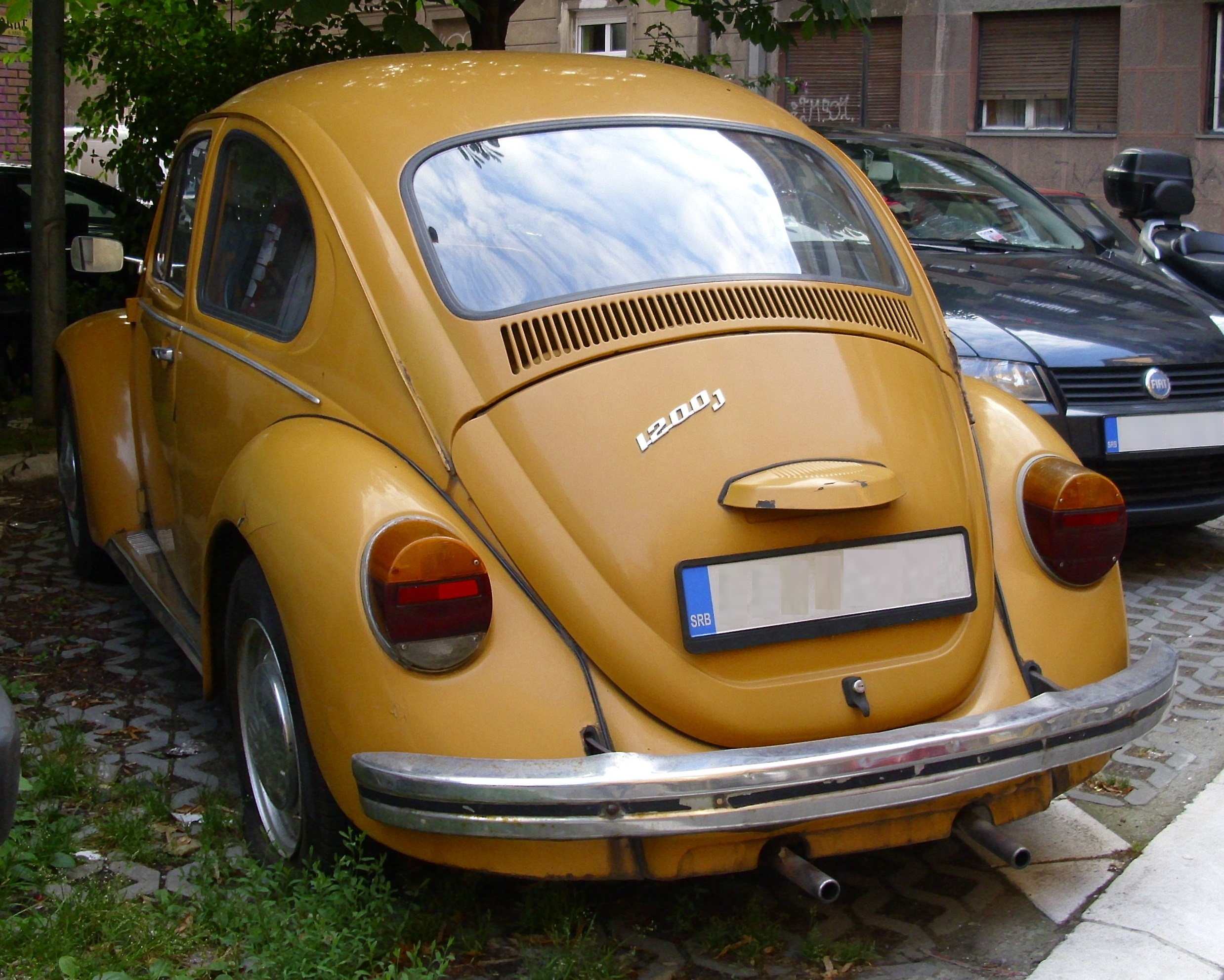 TAS VW 1200 J